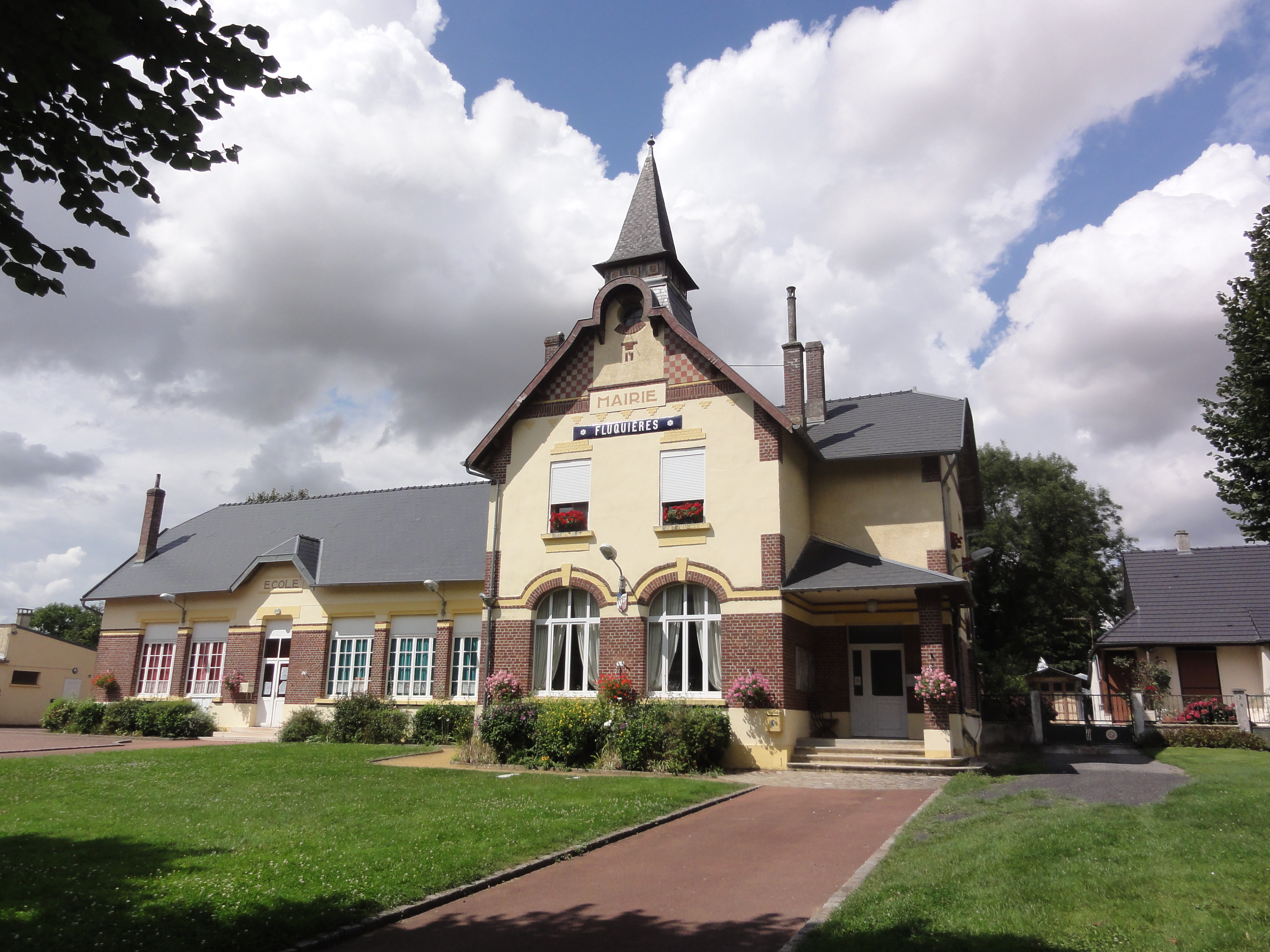 Fluquières (Aisne) mairie-école